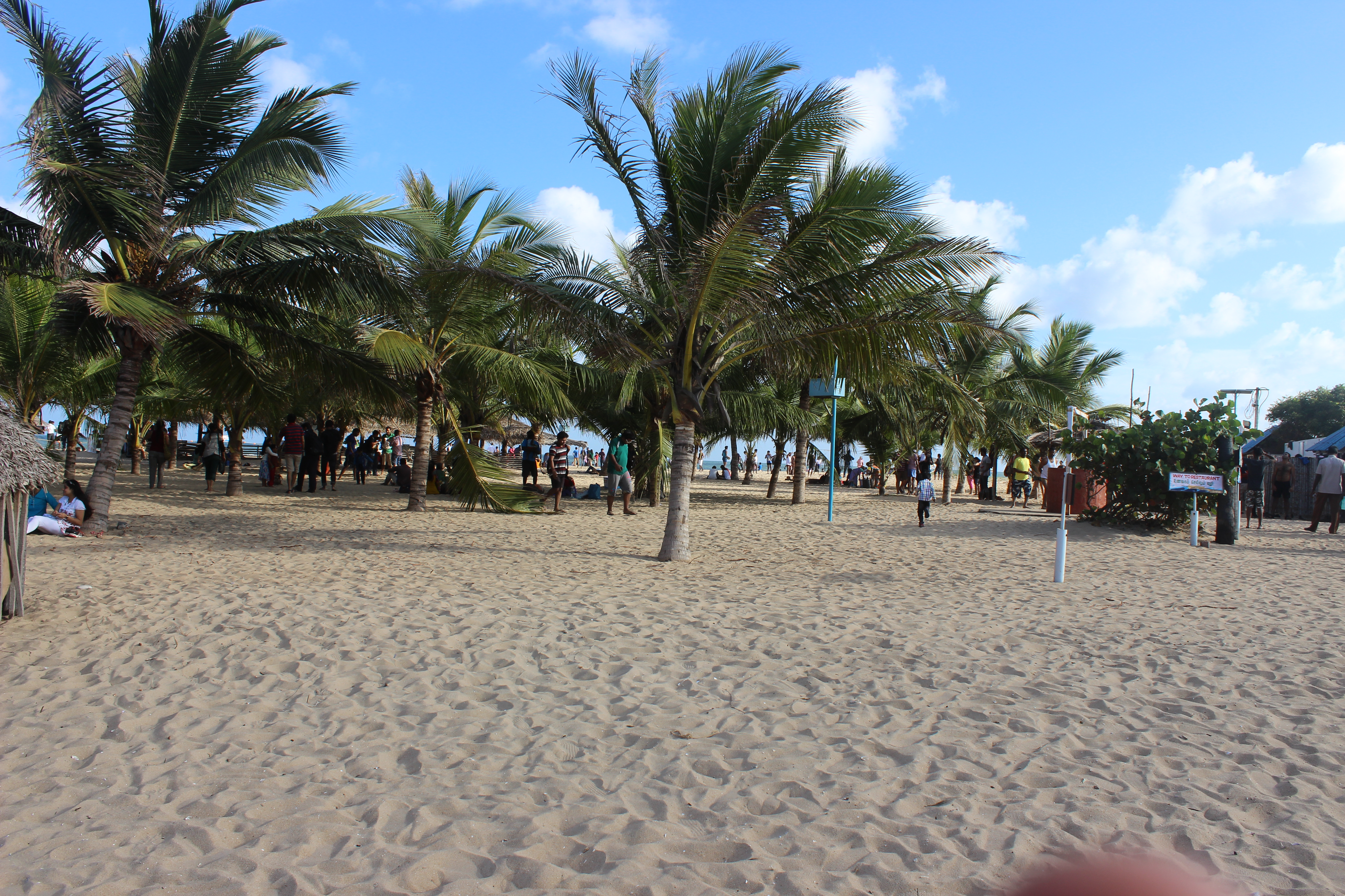 பேரடைஸ் கடற்கரை, புதுச்சேரி